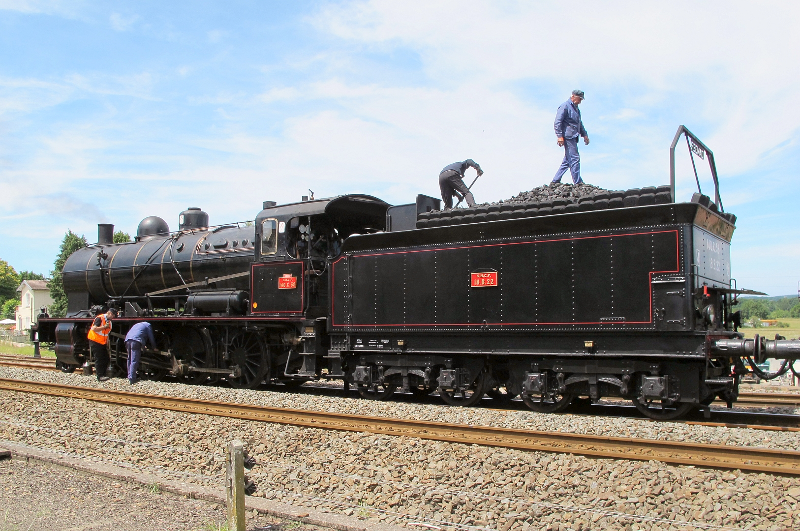 La locomotive 140 C 38 du Chemin de Fer Touristique Limousin Périgord en gare de Thiviers (Dordogne) le 12 juillet 2015.